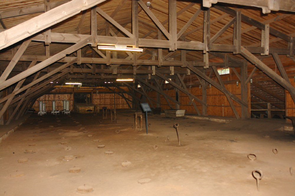 Cathrinesminde Teglvaerk an der Flensburger Förde. Als Ziegelei gegründet 1732, stillgelegt 1968. 1986 bis 1993 restauriert, heute Ziegeleimuseum. Decke über dem Ringofen